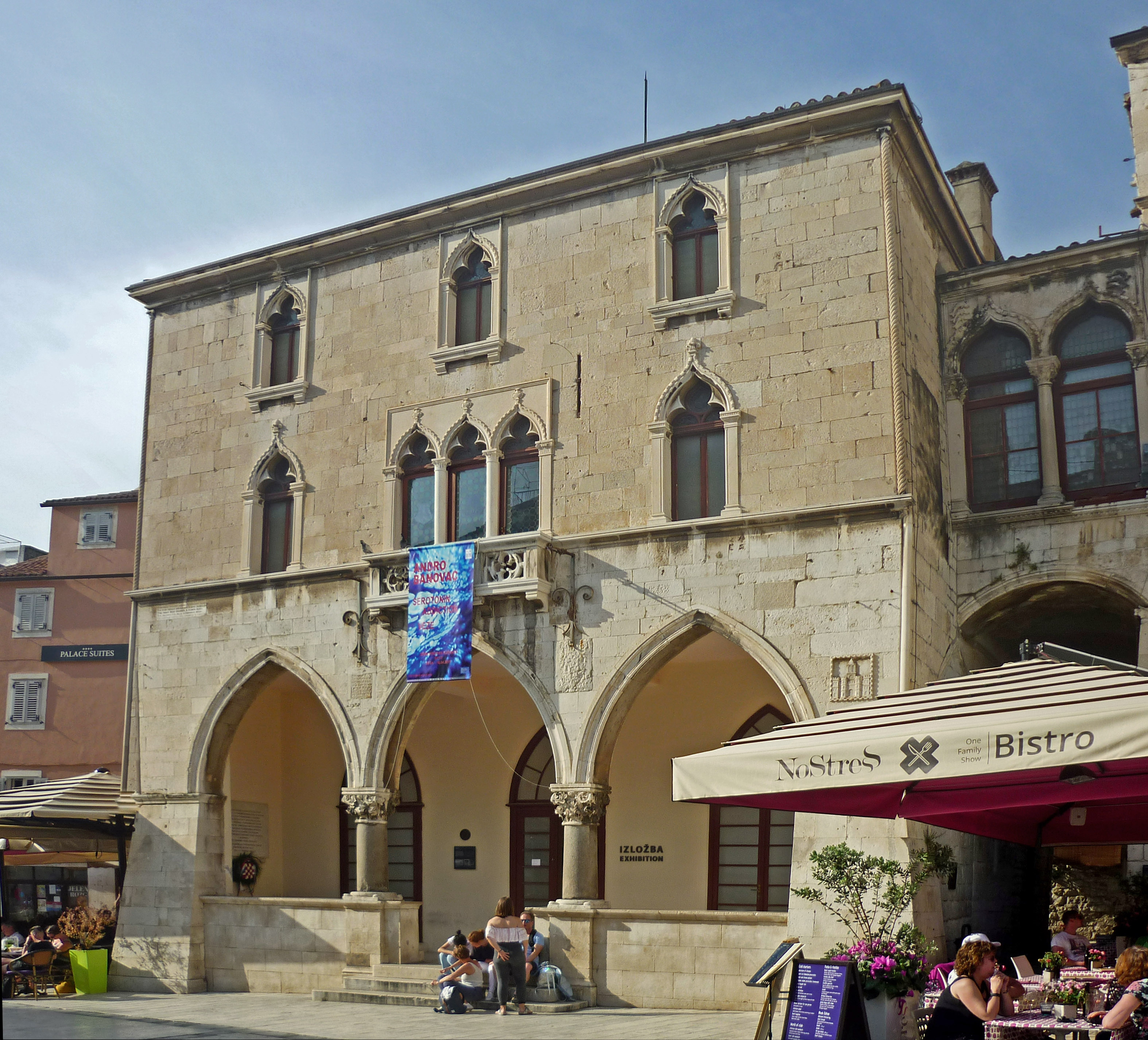 Loggia in Split